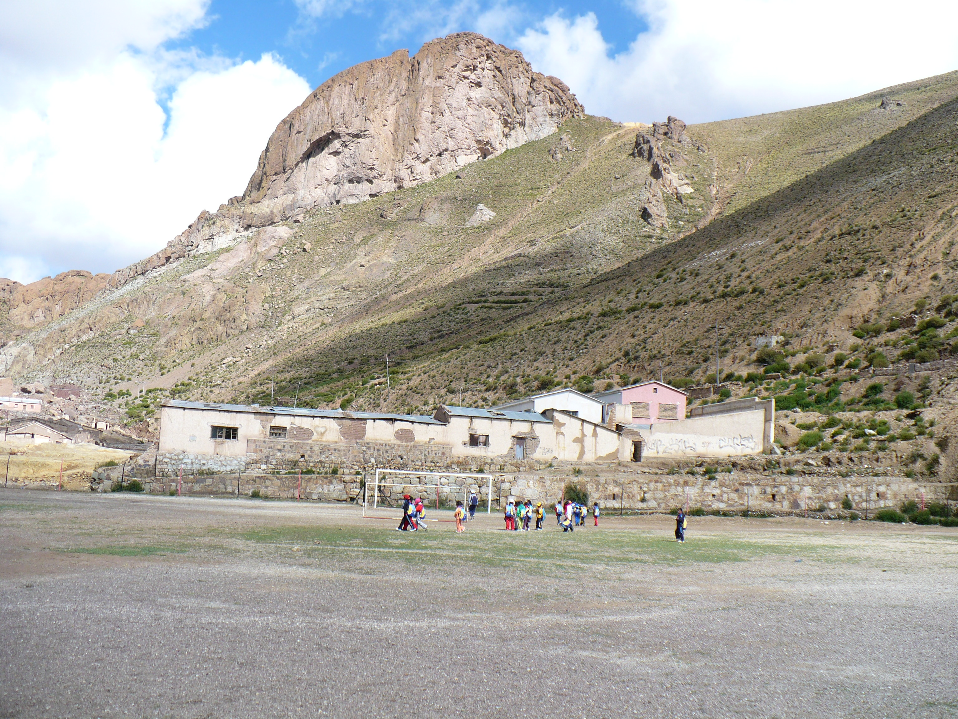 Centro Minero Tatasi